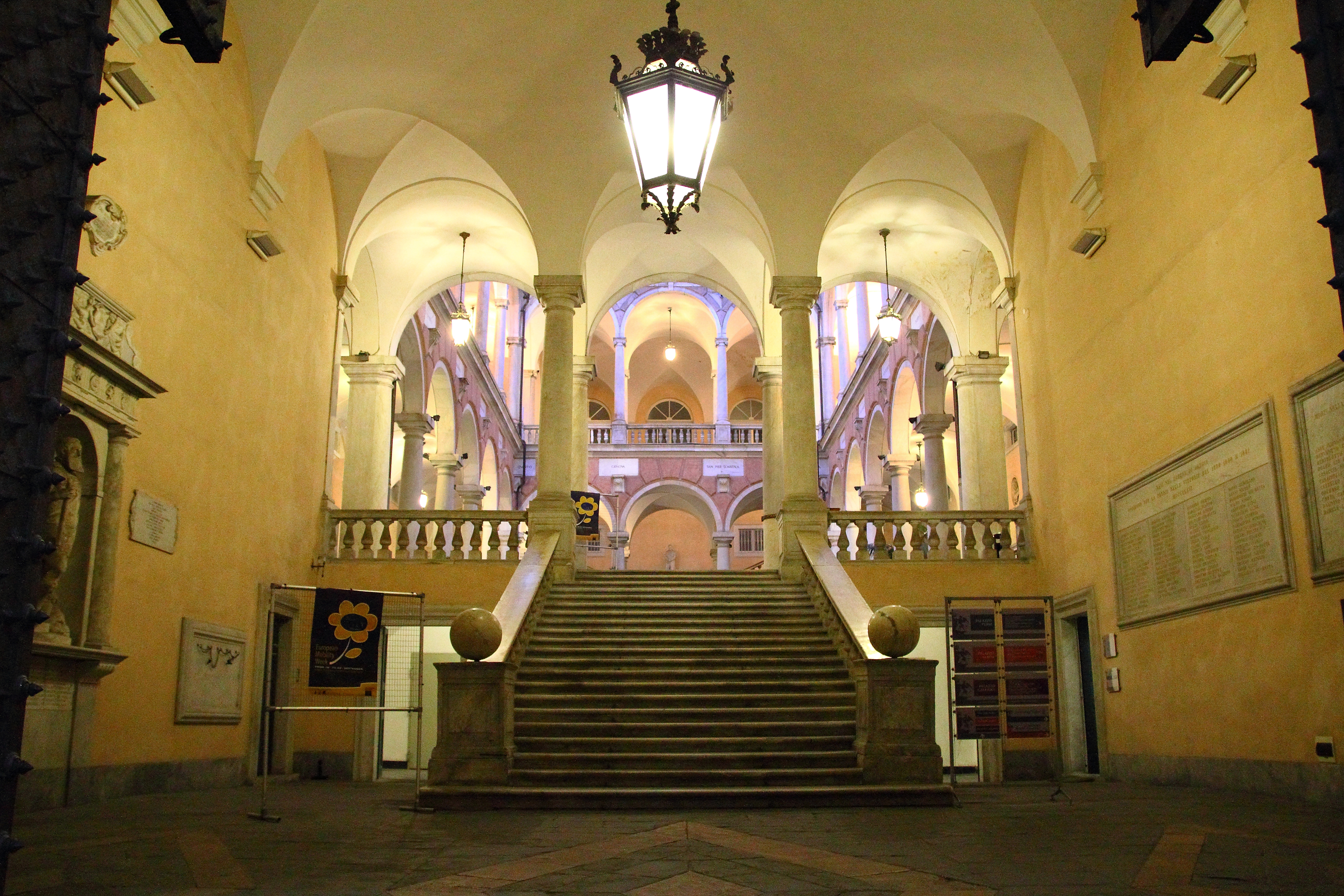 Palazzo Doria-Tursi - Musei di Strada Nuova This is a photo of a monument which is part of cultural heritage of Italy.